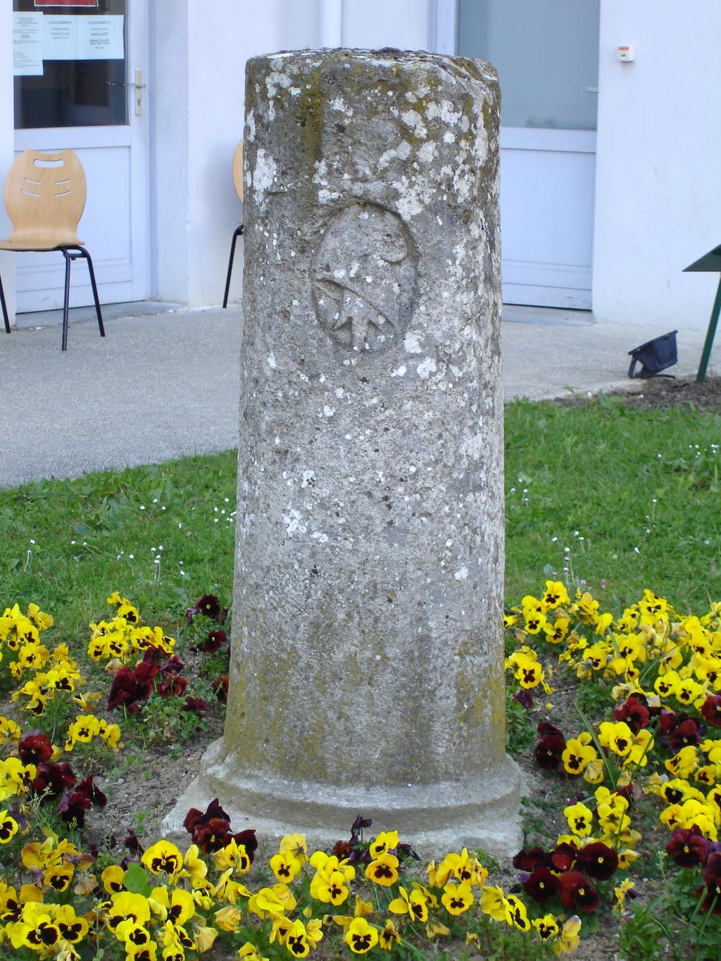 Borne de Mortières à Tremblay-en-France (Seine-Saint-Denis), France Borne armoriée du XVIIIe siècle située au hameau (détruit) de Mortières, à l'emplacement de l'actuel aéroport Charles-de-Gaulle et déplacée au vieux-pays. Une des rares bornes arborant un bonnet phrygien de la période révolutionnaire. Avril 2007 Photo personnelle (own work) de Clicsouris